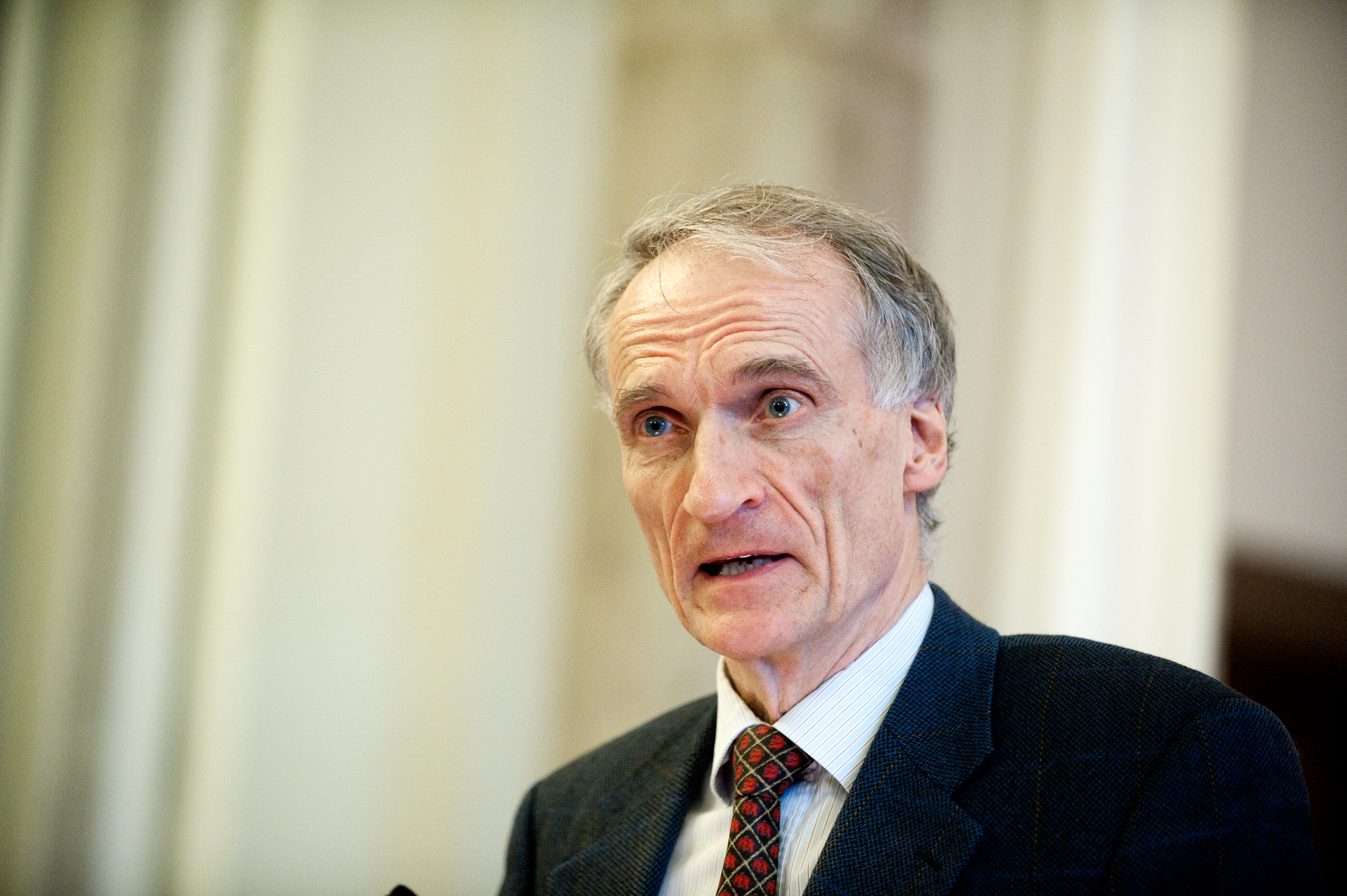 Bertel Haarder, undervisnings- och samarbetsminister Danmark